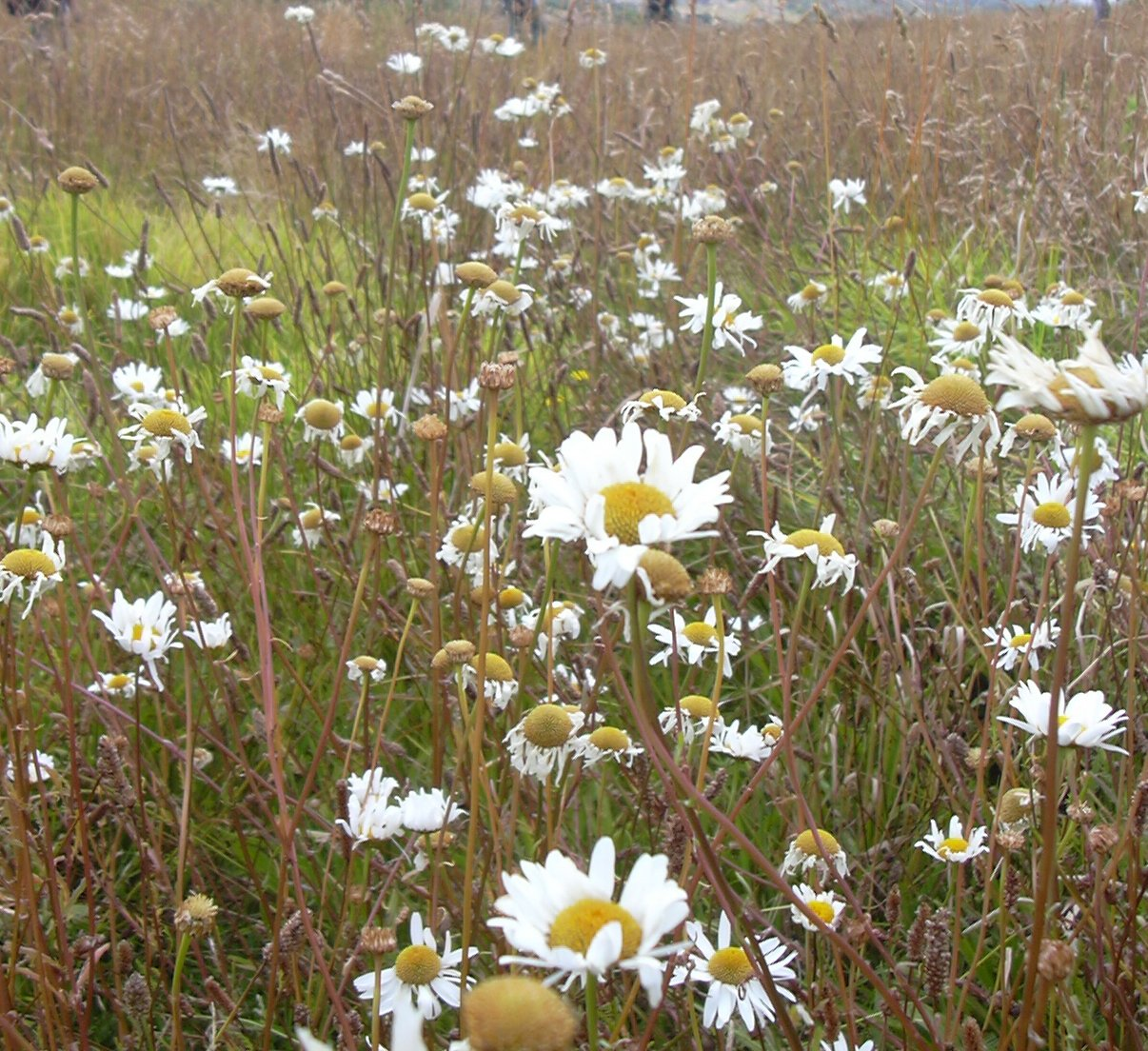 fioritura di Chrysanthemum leucanthemum L'immagine rappresenta una fioritura di Chrysanthemum leucanthemum nell'habitat naturale La foto è stata tratta dal sito: Licenza